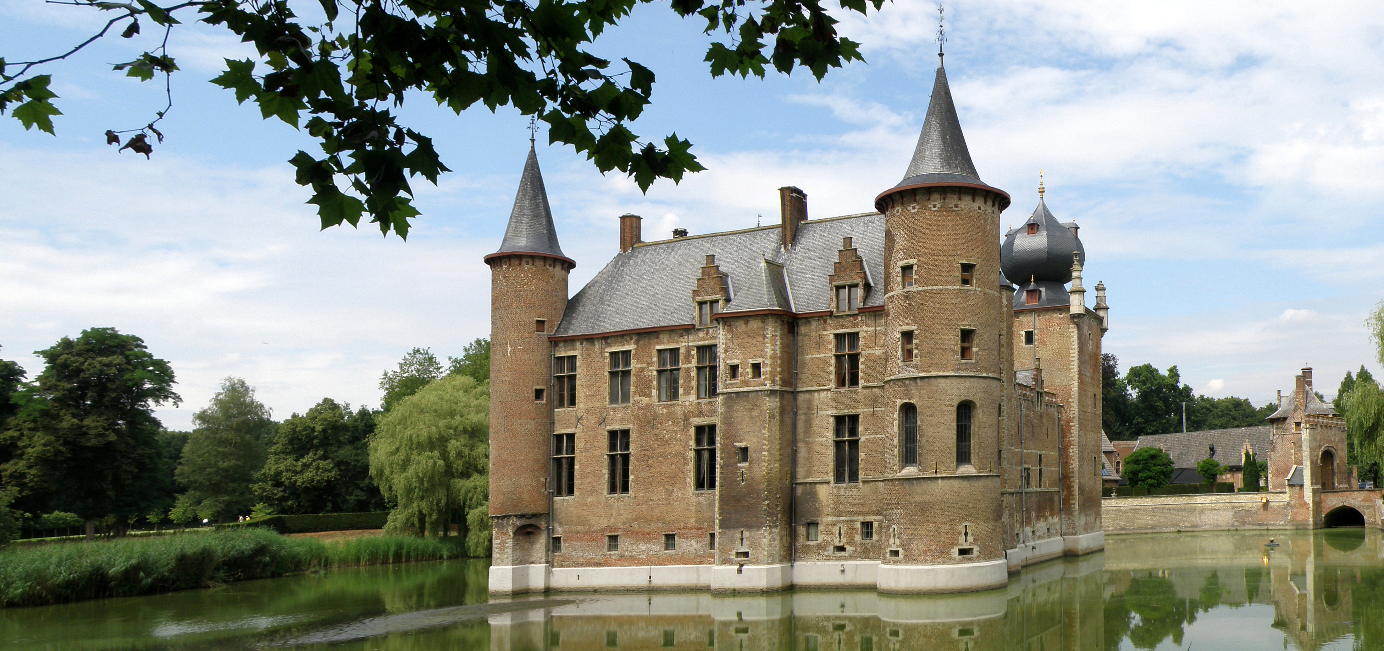 Aartselaar (prov. Antwerpen, België). Kasteel Cleydael.